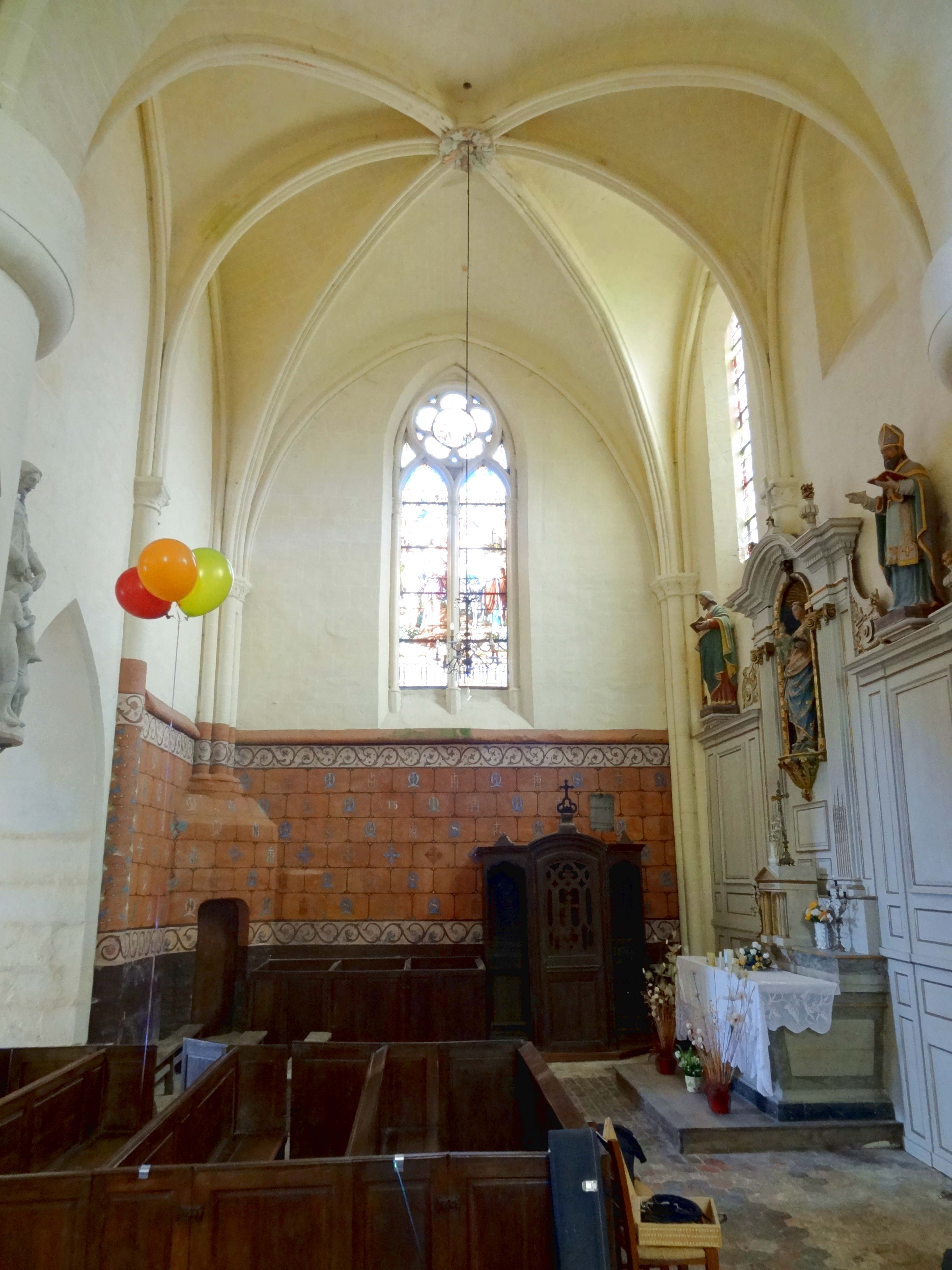 Intérieur de l'église - voir titre.